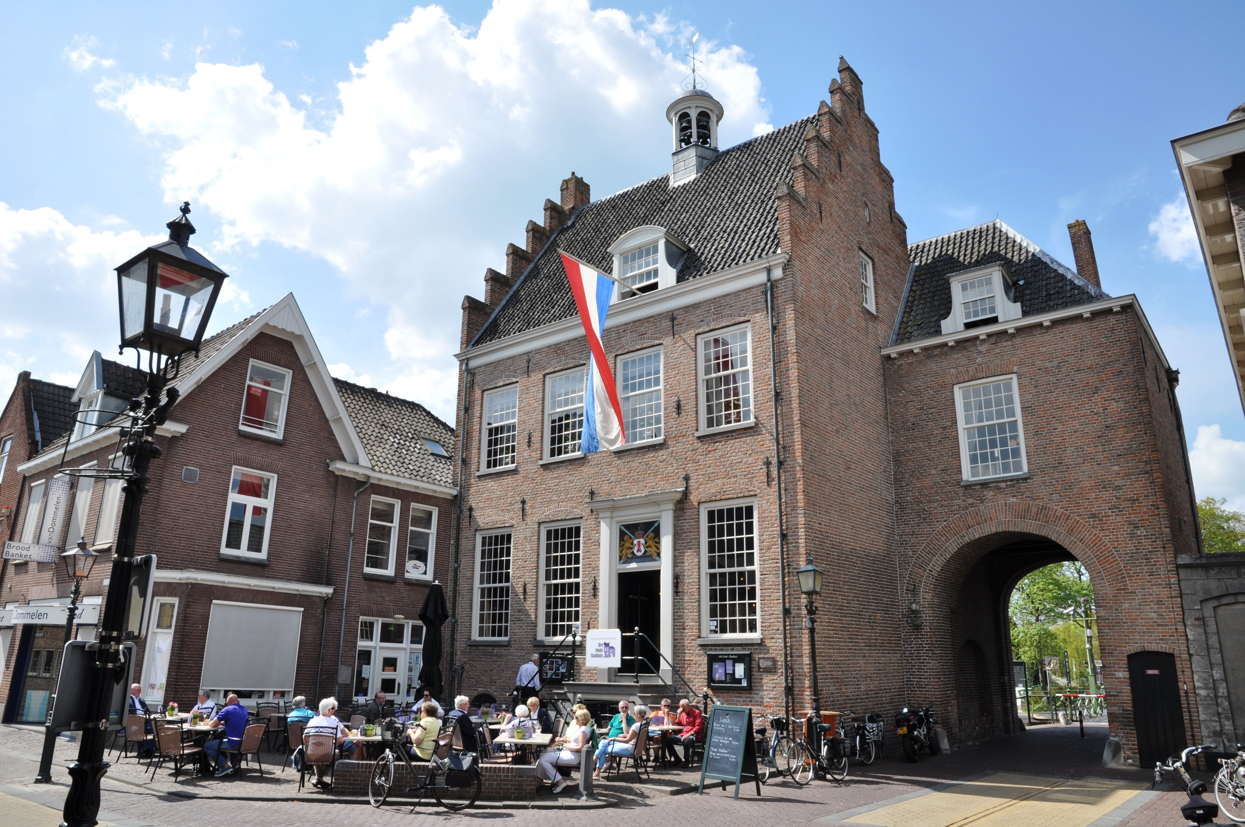 Oude stadhuis van Montfoort